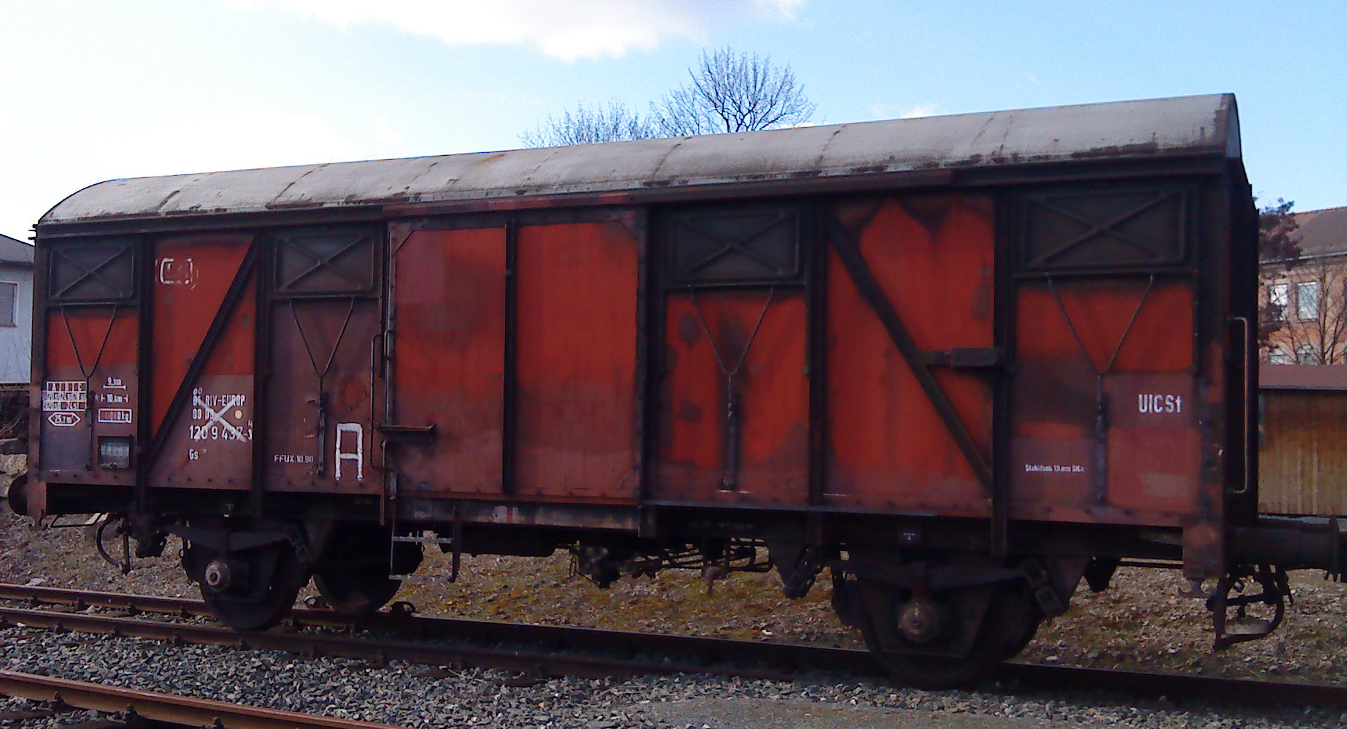 Auf dem Bild ist ein UIC-Standardwagen der Deutschen Bundesbahn, erstes Baujahr 1961, Gattung Gs, Baureihe 210 mit 5,84 m Achsstand zusehen. Diese Baureihe kann wegen der Verwendung von Altteilen leicht differierende Bauformen haben.